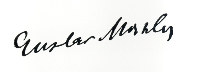 Signature de Gustav Mahler